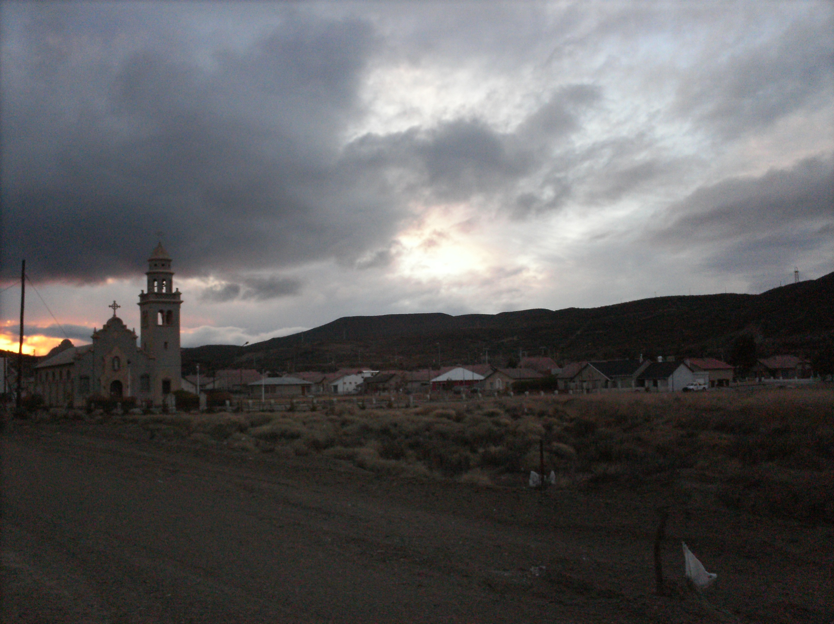 la iglesia y el barrio en la soledad